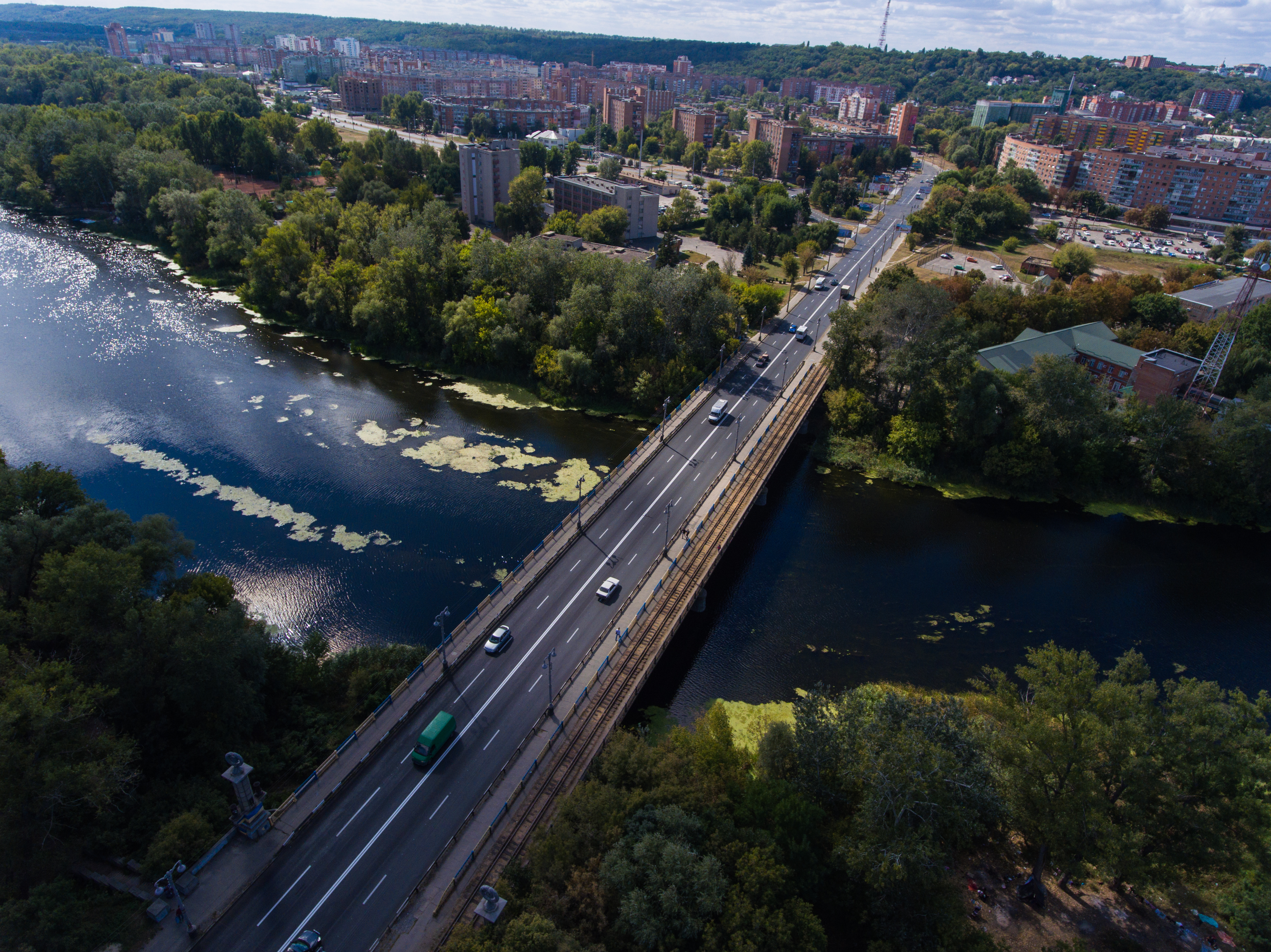 Міст через річку Ворскла, Полтава, вул. Миру